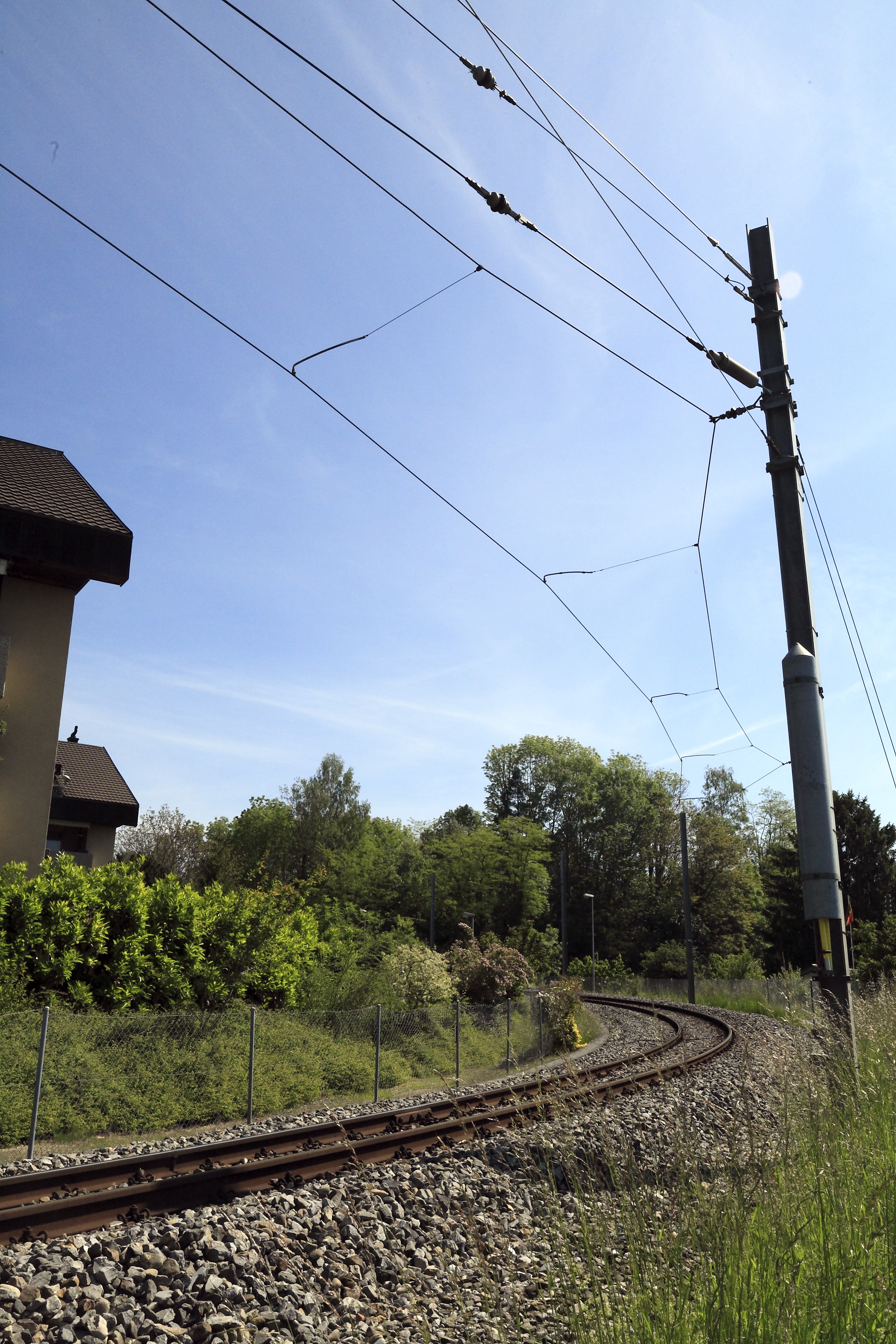 Linksbogen vom Bahnhof Ins Richtung Ins Dorf, das Tragseil ist auslegerlos an den im Außenbogen stehenden Masten aufgehängt. Die nahezu waagerecht liegenden Hänger halten den Fahrdraht mit nur kleinen Ausschlägen über dem Gleis, im Vergleich zur Regelfahrleitung sind deutlich weniger Masten erforderlich. Der mögliche Anhub beim Stromabnehmerdurchgang ist allerdings größer.